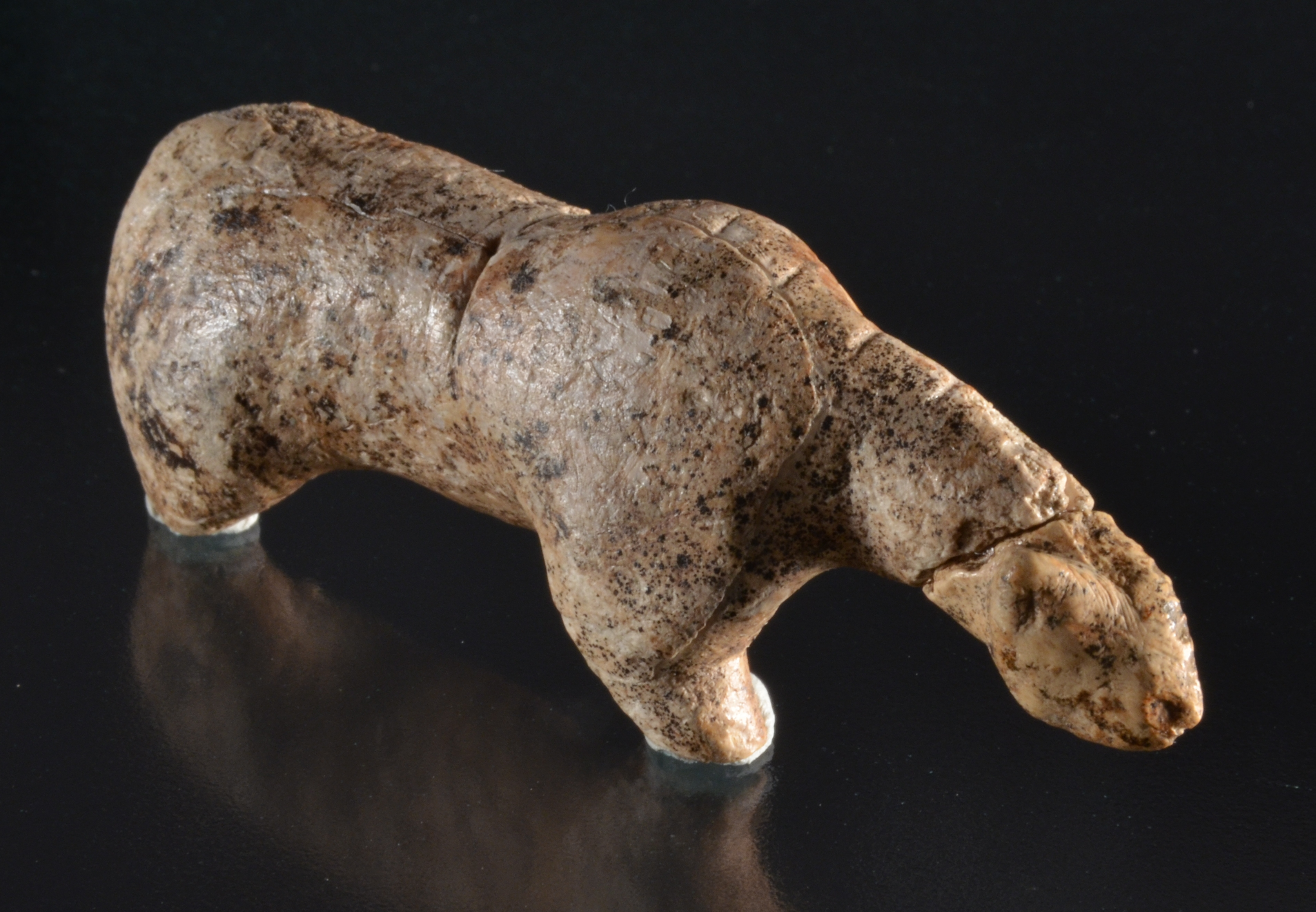 was ist es?